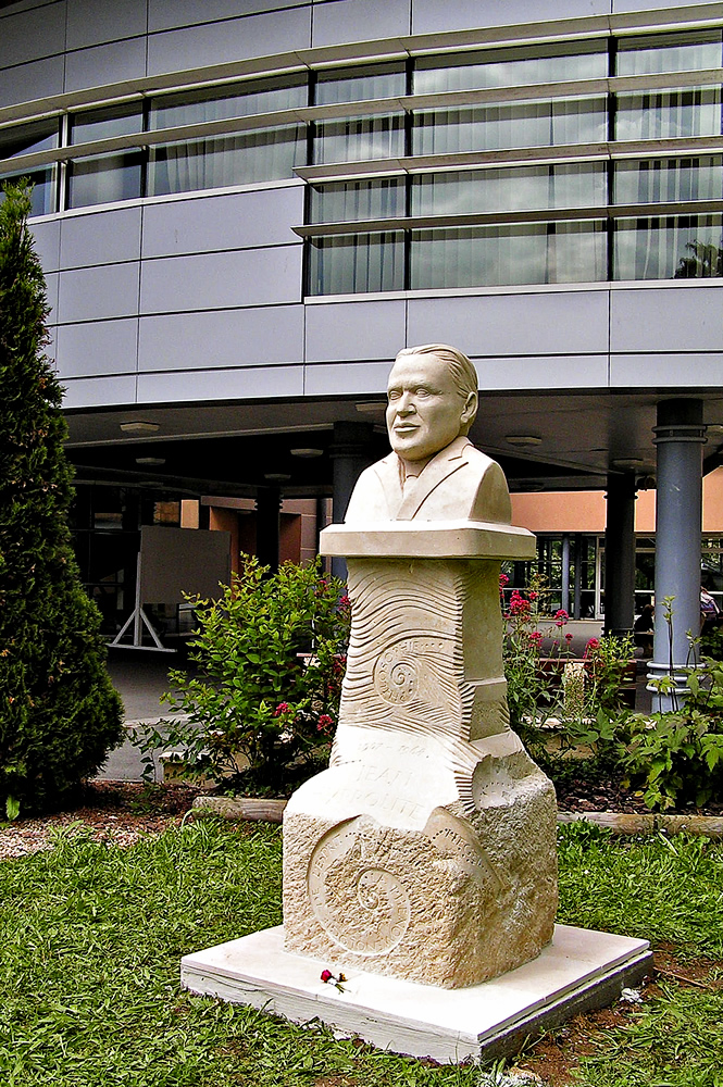 Buste de Jean Hyppolite, sculpté par Jean-Marie Meslin (17 - Le Bois-Plage - Île de Ré), dans la cour du Lycée Jean Hyppolite de Jonzac(17).